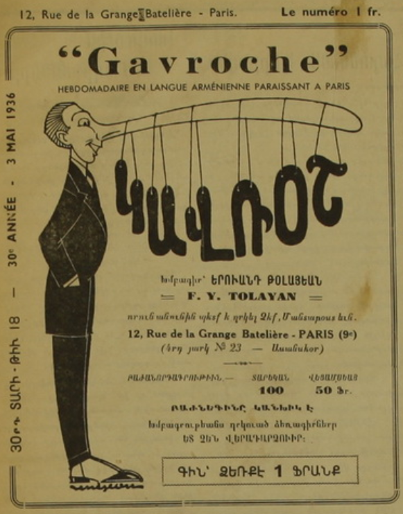 Manchette du journal Gavroche (1908-1936) du 3 mai 1936.